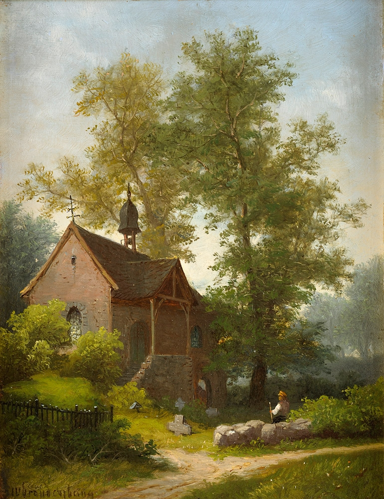 Kapelle an der Mosel (Morgen). Signiert. Rückseite betitelt. Öl/Holz, 27 x 20 cm.